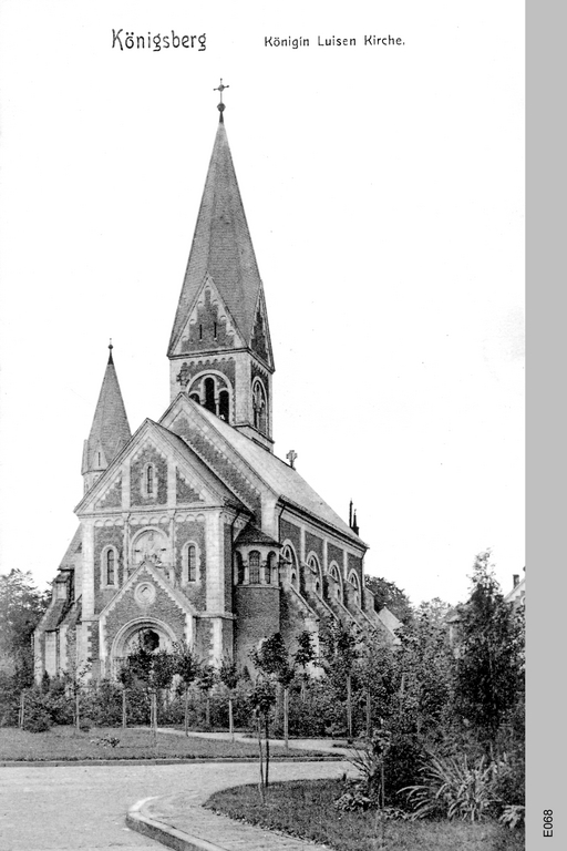 Königsberg